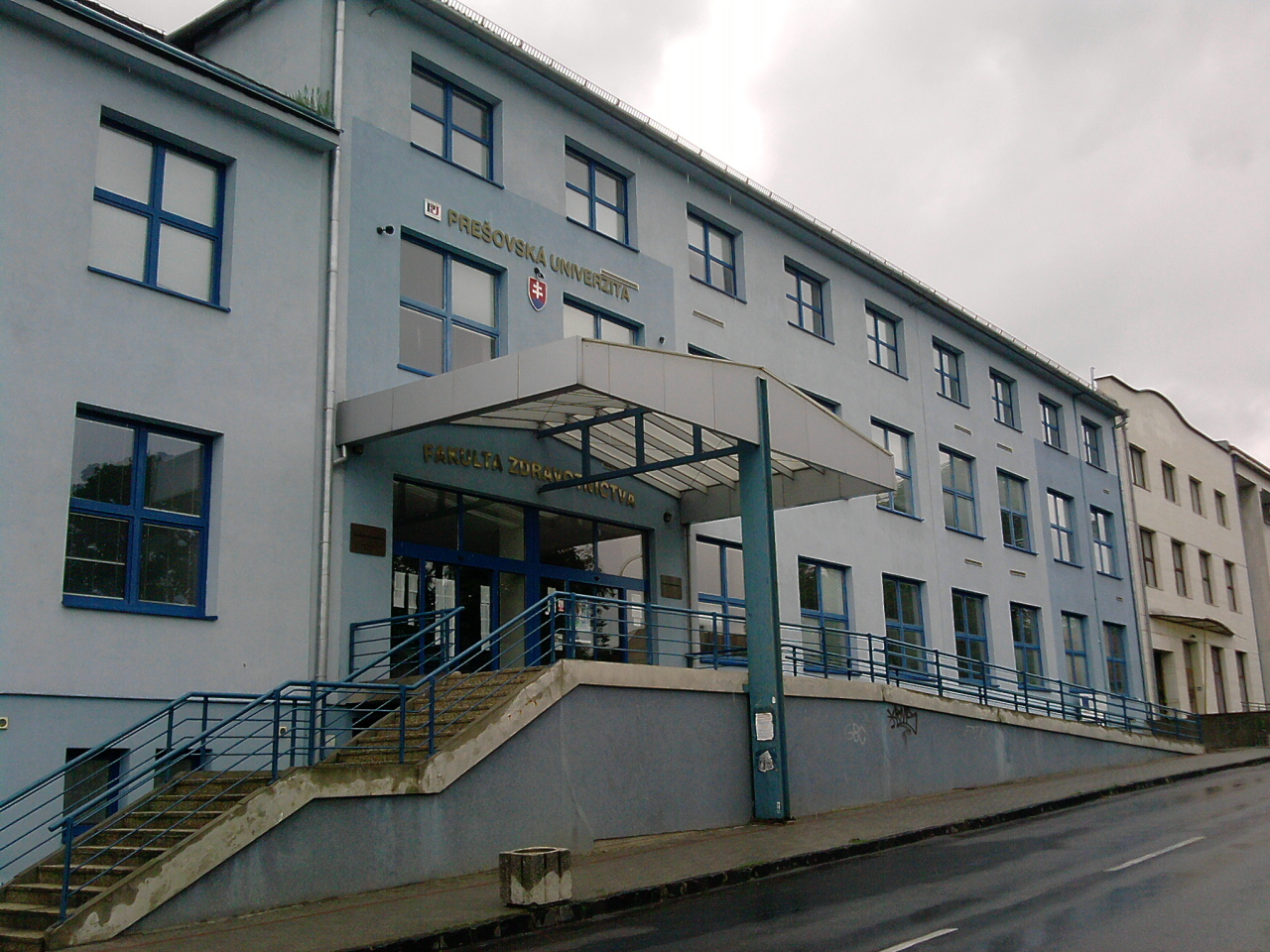 Fakulta zdravotníckych odborov Prešovskej univerzity, Partizánska ul., Prešov